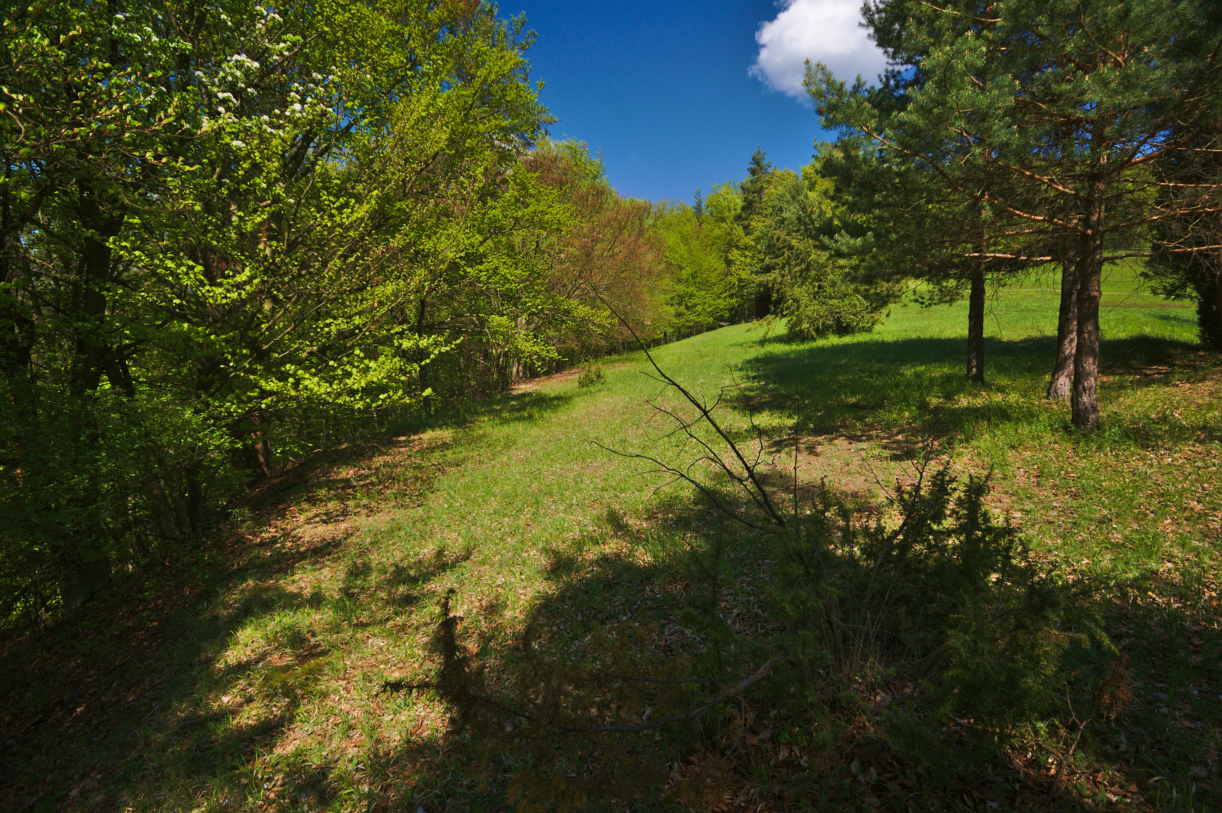 Přírodní památka Křižník, okres Žďár nad Sázavou